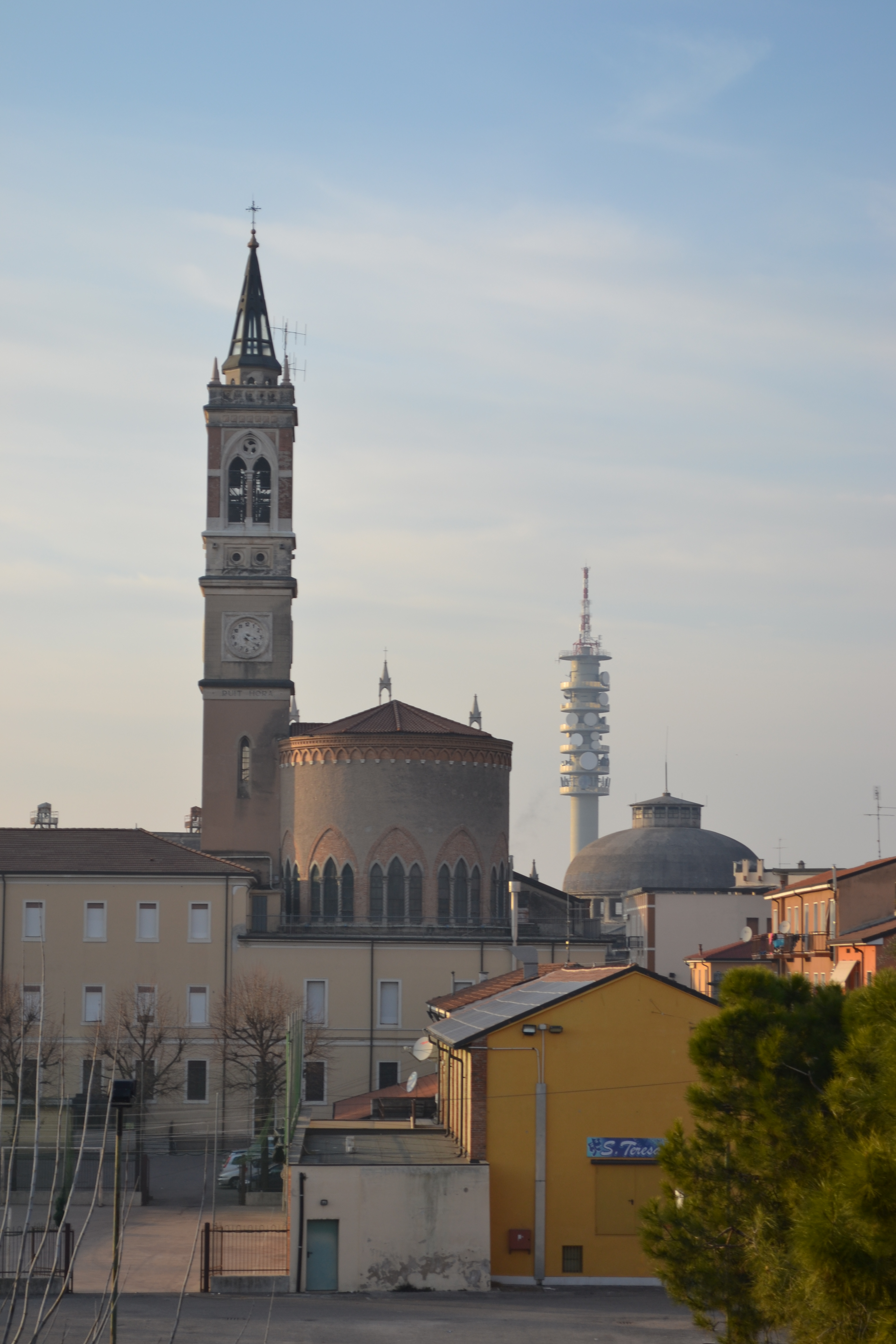 Il santuario di santa Teresa fotografato da un palazzo di via P. F. Calvi